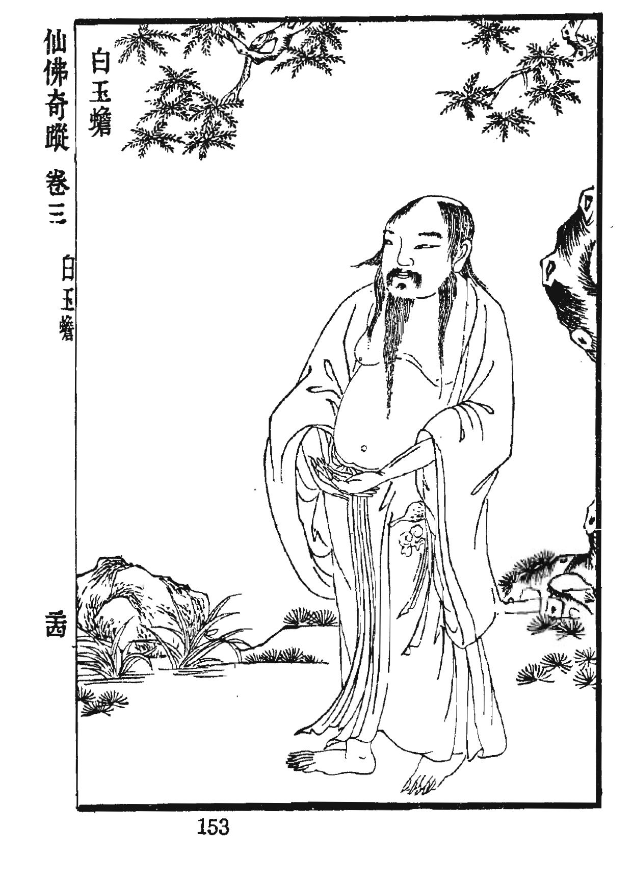 仙佛奇蹤插圖